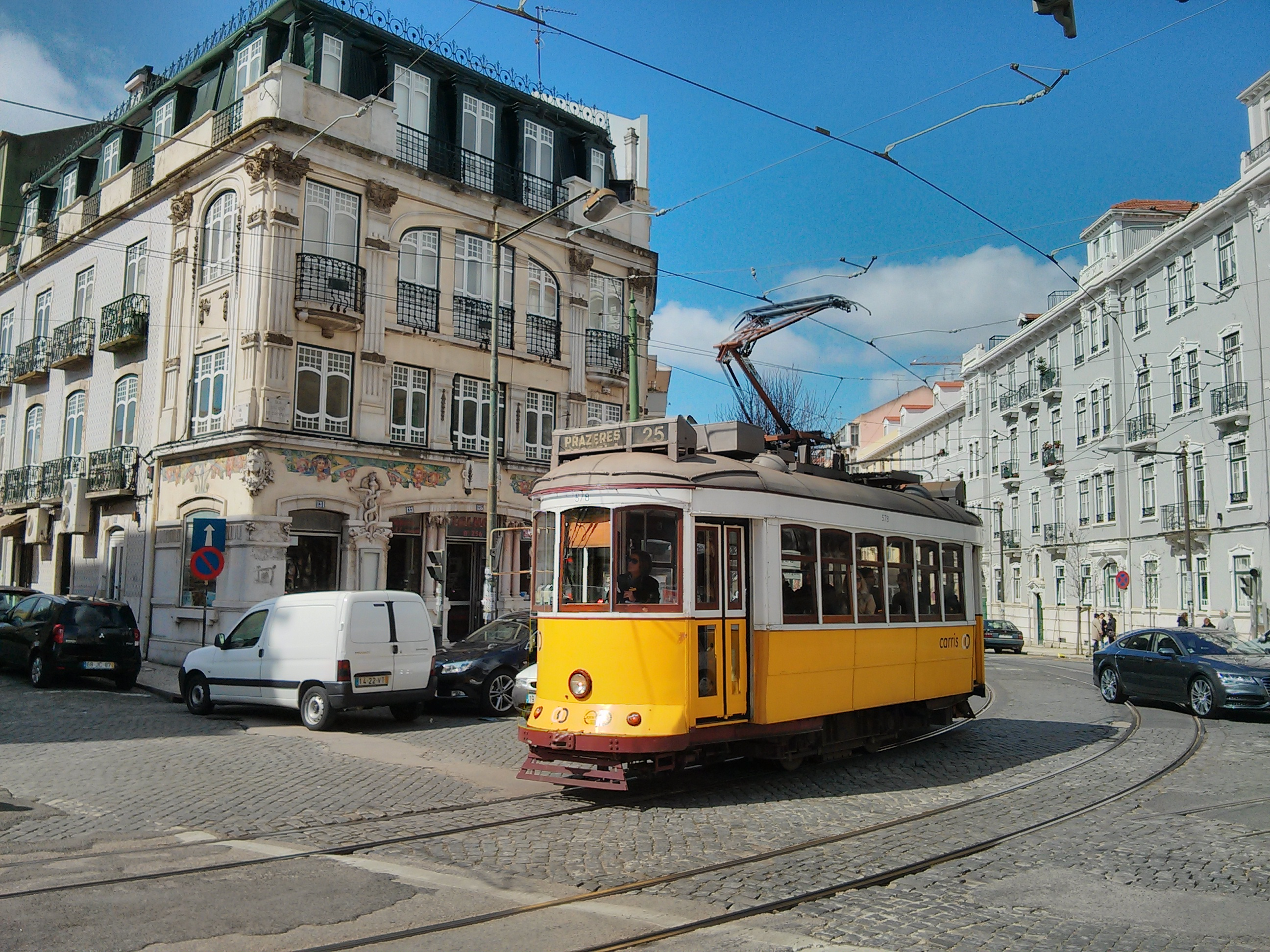 lisboa